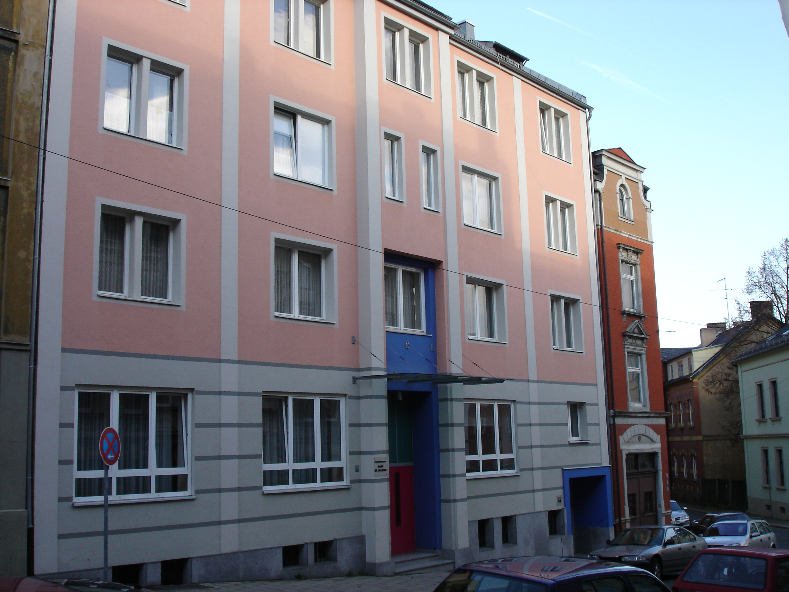 Katholisches Pfarrgemeinde-Haus-St.-Marien in Hof an der Saale